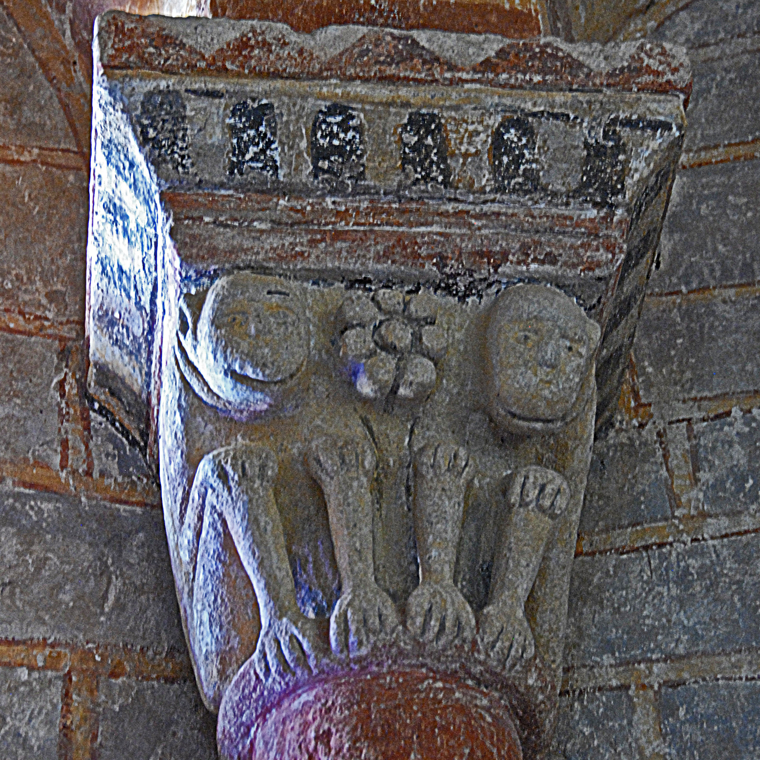 St.-Jean Glaine-Montaigut; Kapitell, zwei hockende Affen